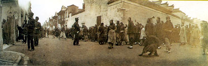 1905年12月8日工部局巡捕在会审公廨大打出手后，激起市民公愤。市民集聚街头投掷石块，与巡捕对峙。